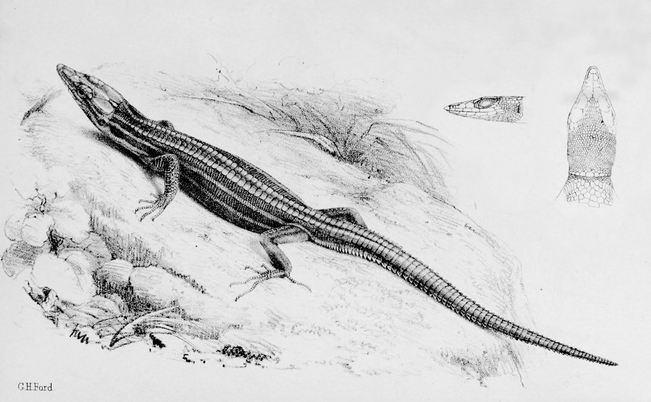 Holaspis guentheri